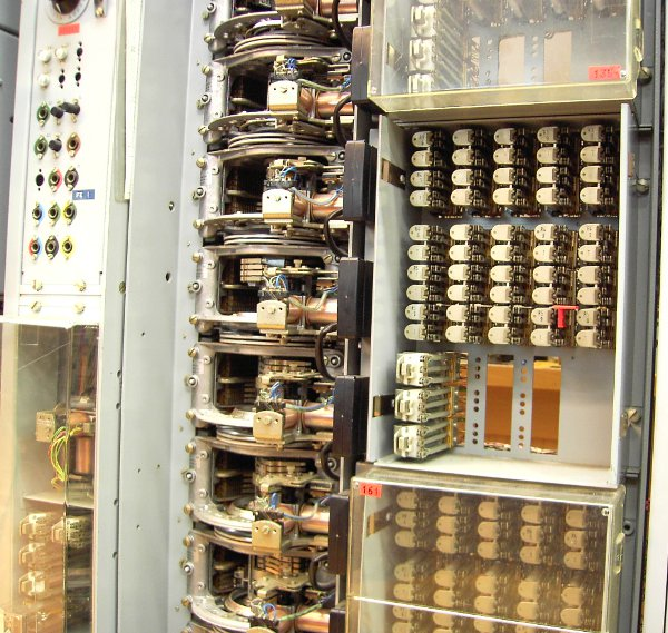 Das Bild zeigt den Gestellrahmen mit dem Anrufsuchern aus dem EMD System 55v Links: Feld für den Auswahlschalter, Prüftasten und Prüfklinken, Motorwähler des Anrufordner und Teile vom Relaissatz des Anrufordners Mitte: Anrufsucher EMD Wähler Rechts: Teilnehmerschaltung mit kleinen Doppelrelais, mit dem roten Plastikklammer kann ein Teilnehmeranschluss gesperrt werden. Die drei Flachrelais in dem geöffneten Feld sind die Relais C.